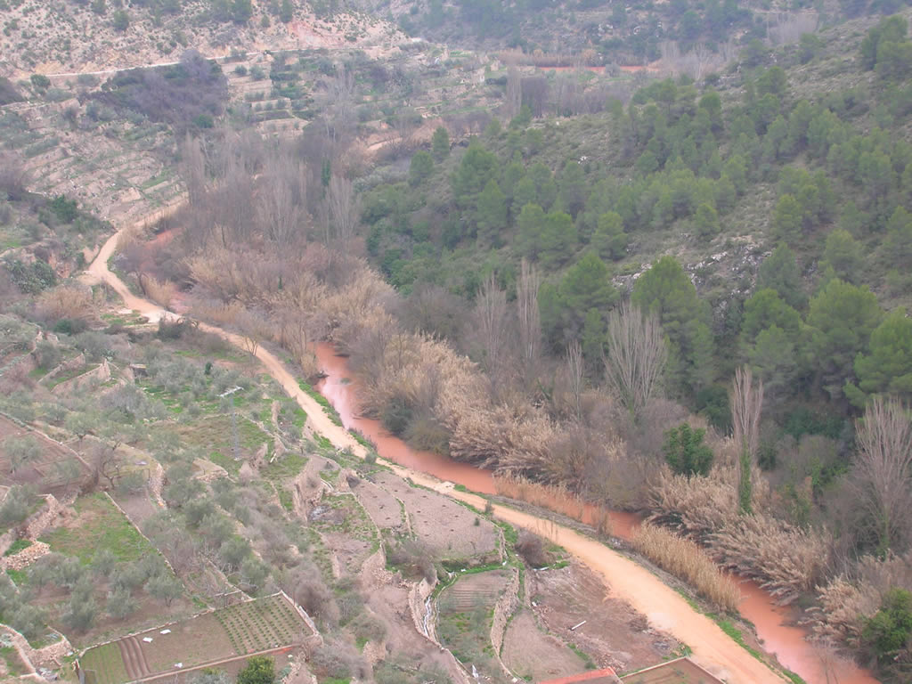 Río Mundo desde un mirador de Liétor, Albacete, España. A la izquierda, un camino, y a la derecha, el río, muy removido tras algunos días de nieve. Foto tomada el 5 de febrero de 2006. River Mundo as seen from Lietor, Albacete, Spain.